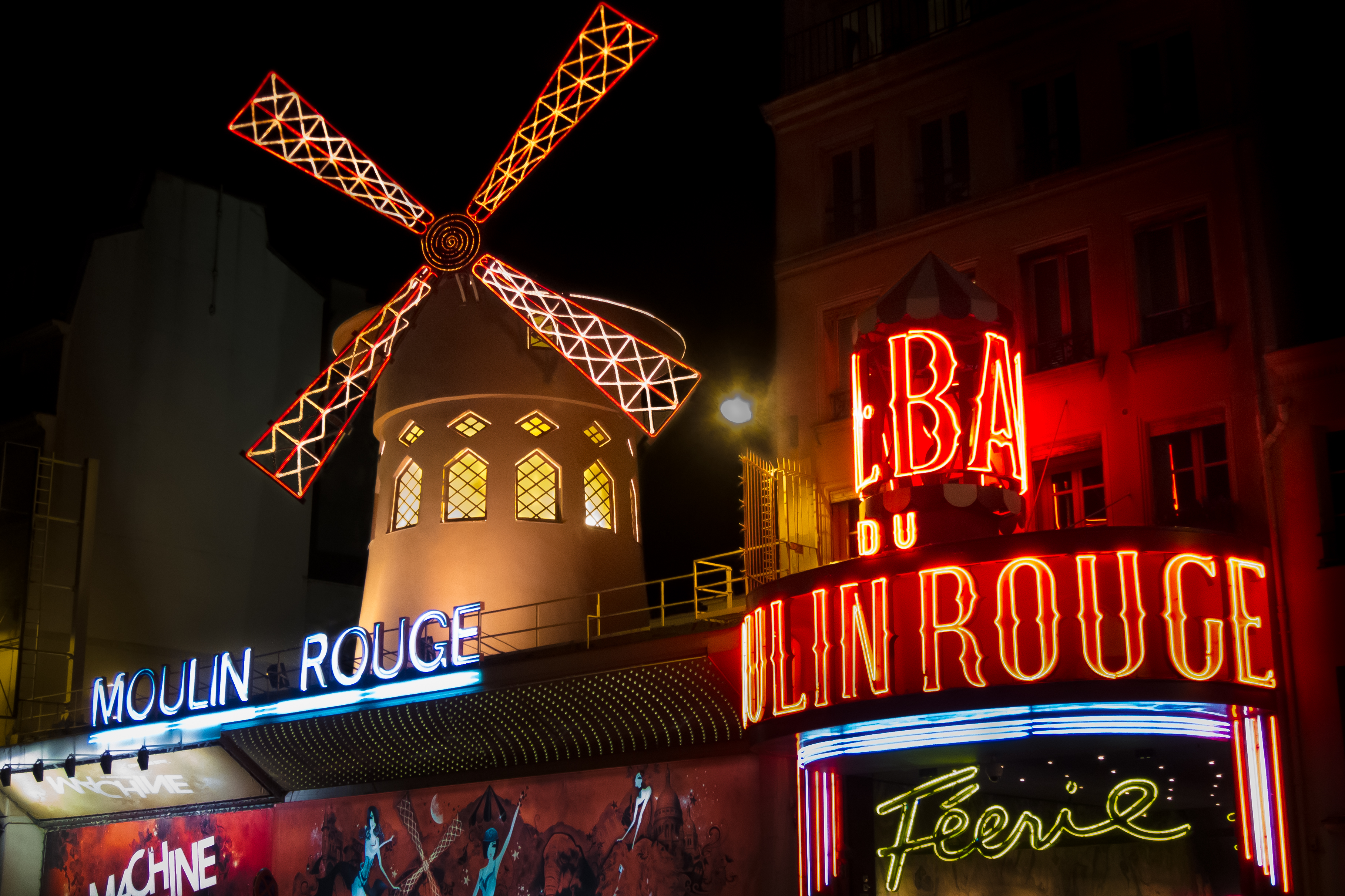 Fachada del Moulin Rouge. París.